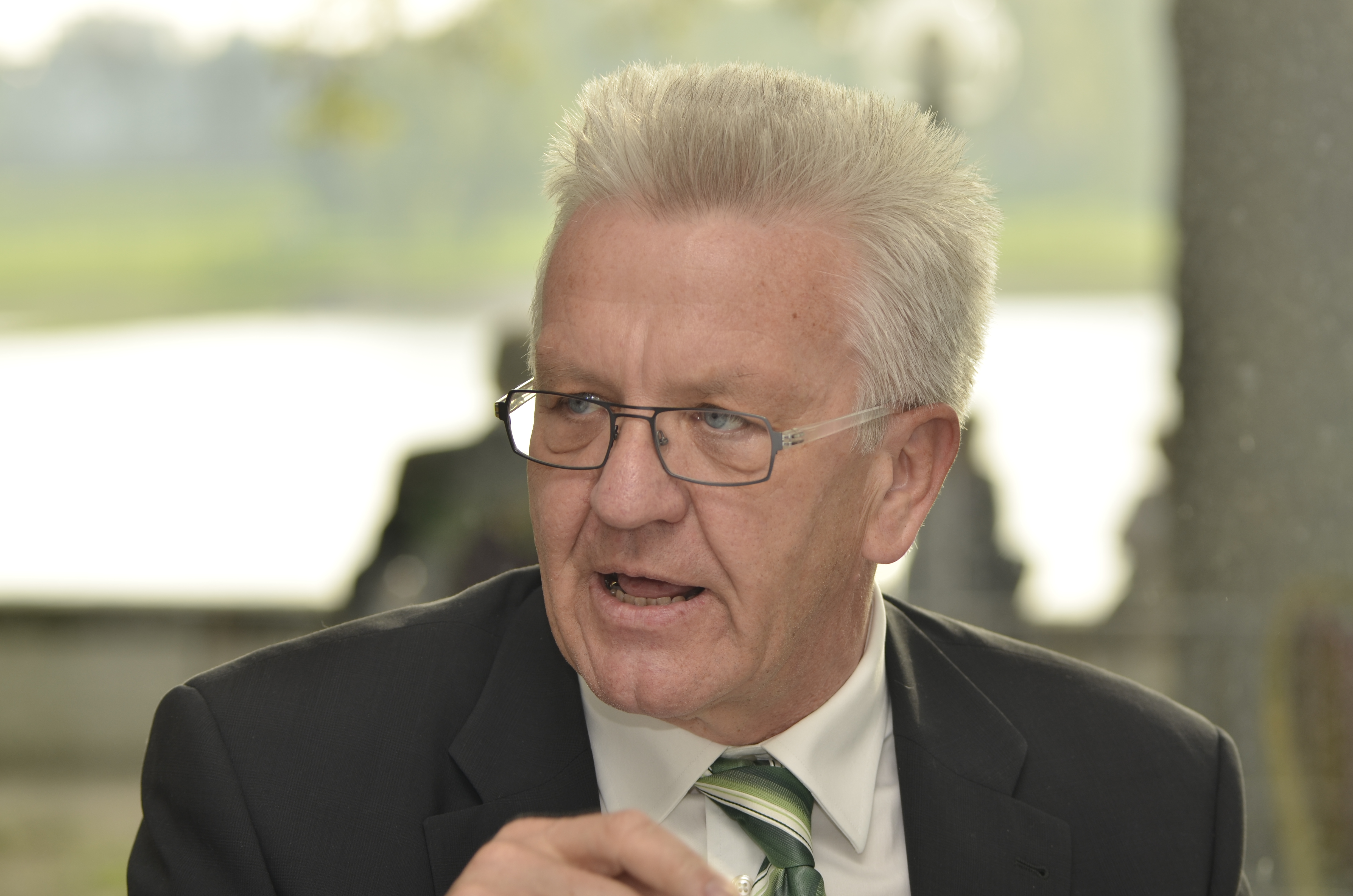 Pressegespräch vor der Grüne im Dialog Veranstaltung: Einmischen possible mit Winfried Kretschmann und Sylvia Löhrmann Wie kann Bürgerbeteiligung gestärkt werden? 7. Mai · 19:00 Uhr, Rheinterrasse Düsseldorf, Joseph-Beuys-Ufer Mit: Winfried Kretschmann, Ministerpräsident Baden-Württemberg Sylvia Löhrmann, Spitzenkandidatin der Grünen NRW und stellvertretende Ministerpräsidentin NRW